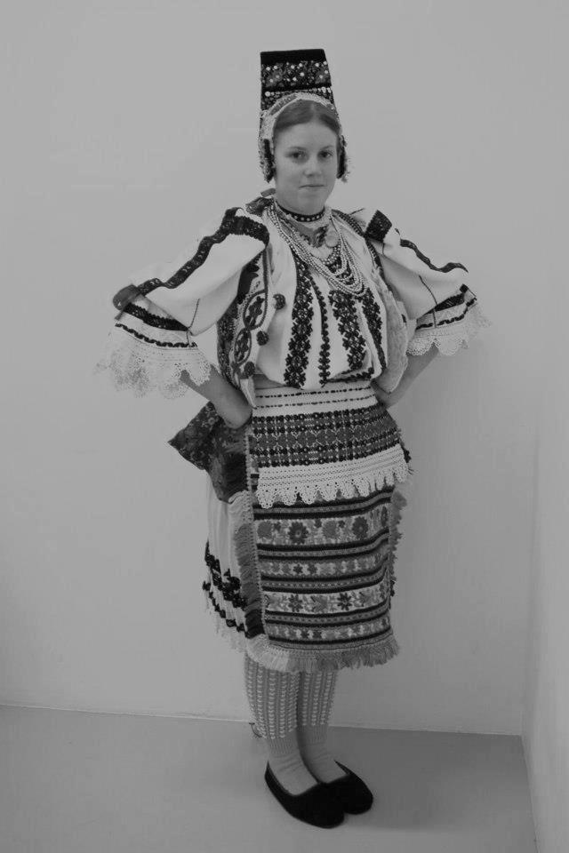 Srpskohrvatski / српскохрватски: Bošnjakuša iz Baranje, Baranjska Bošnjačka ženska nošnja